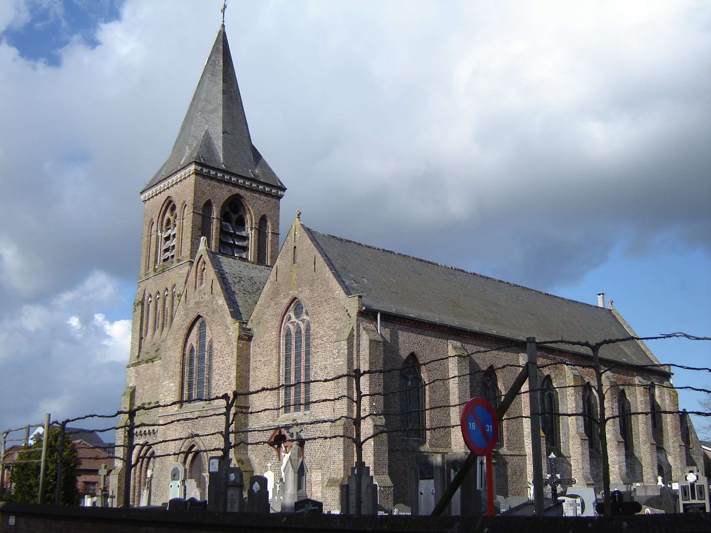 Sint-Vedastuskerk in Zerkegem Church of Saint Vedastus in Zerkegem, Jabbeke, West Flanders, Belgium